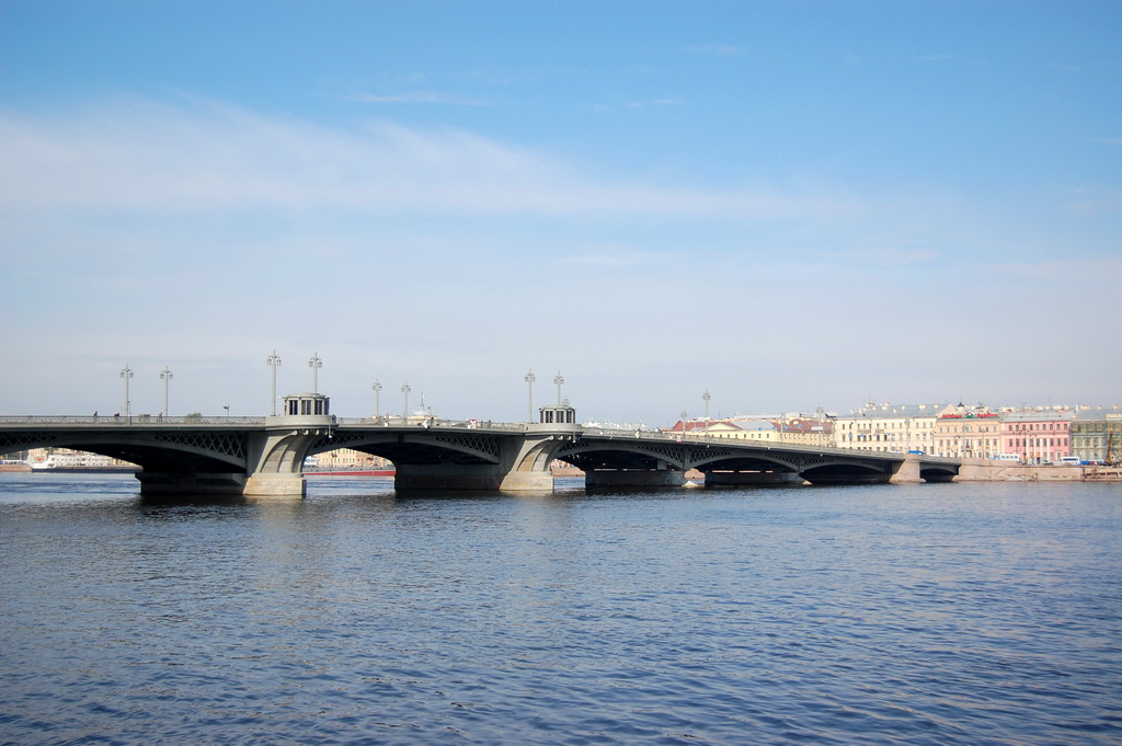 Blagoveshchensky Bridge